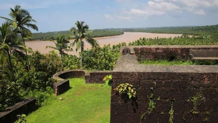 ചന്ദ്രഗിരി കോട്ട മേൽപറമ്പ് കാസറഗോഡ് , കേരളം